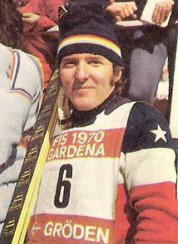 CAMPIONI DELLO SPORT PANINI 1970 1971 312 BILL KIDD SPORT INVERNALI